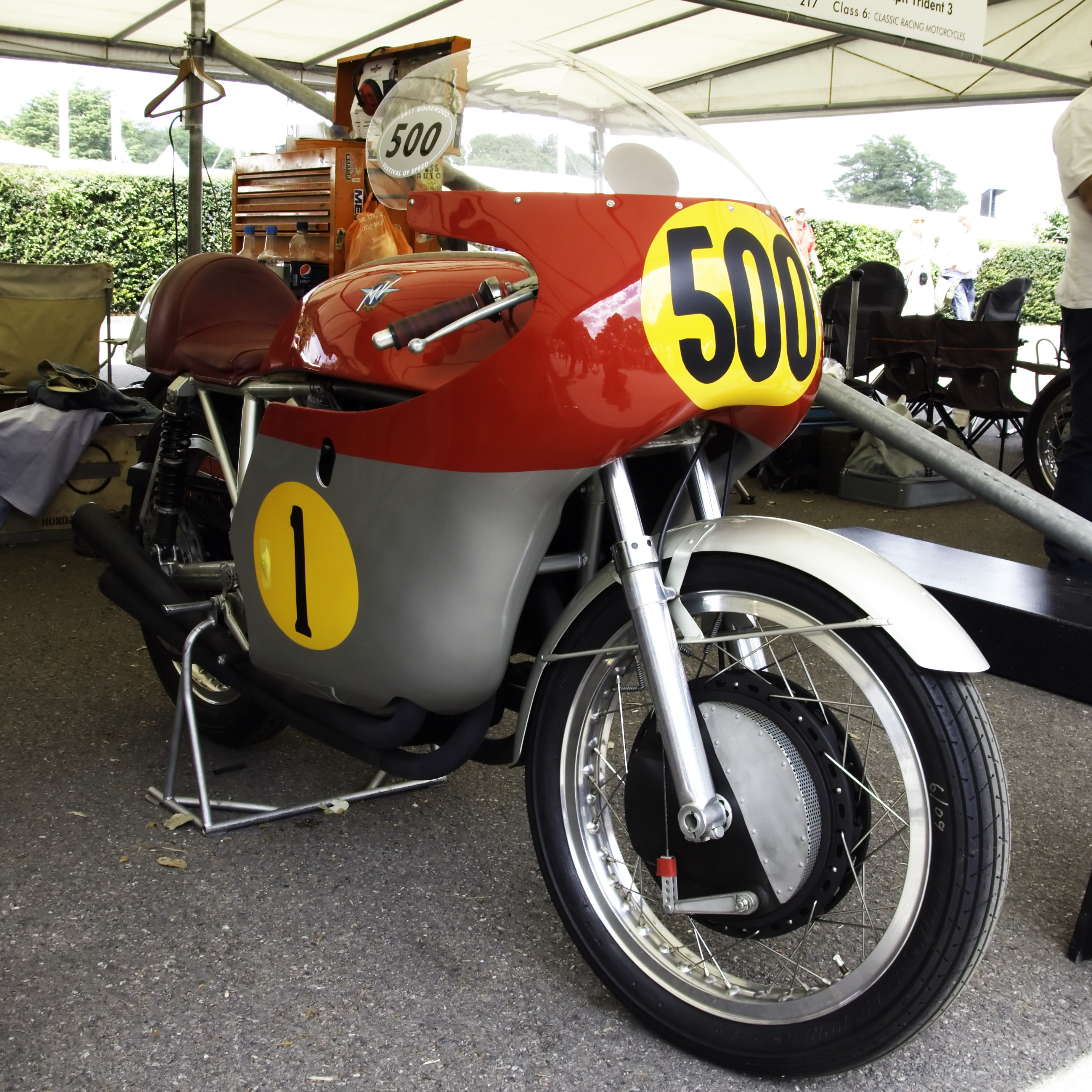 1960, as ridden by John Surtees